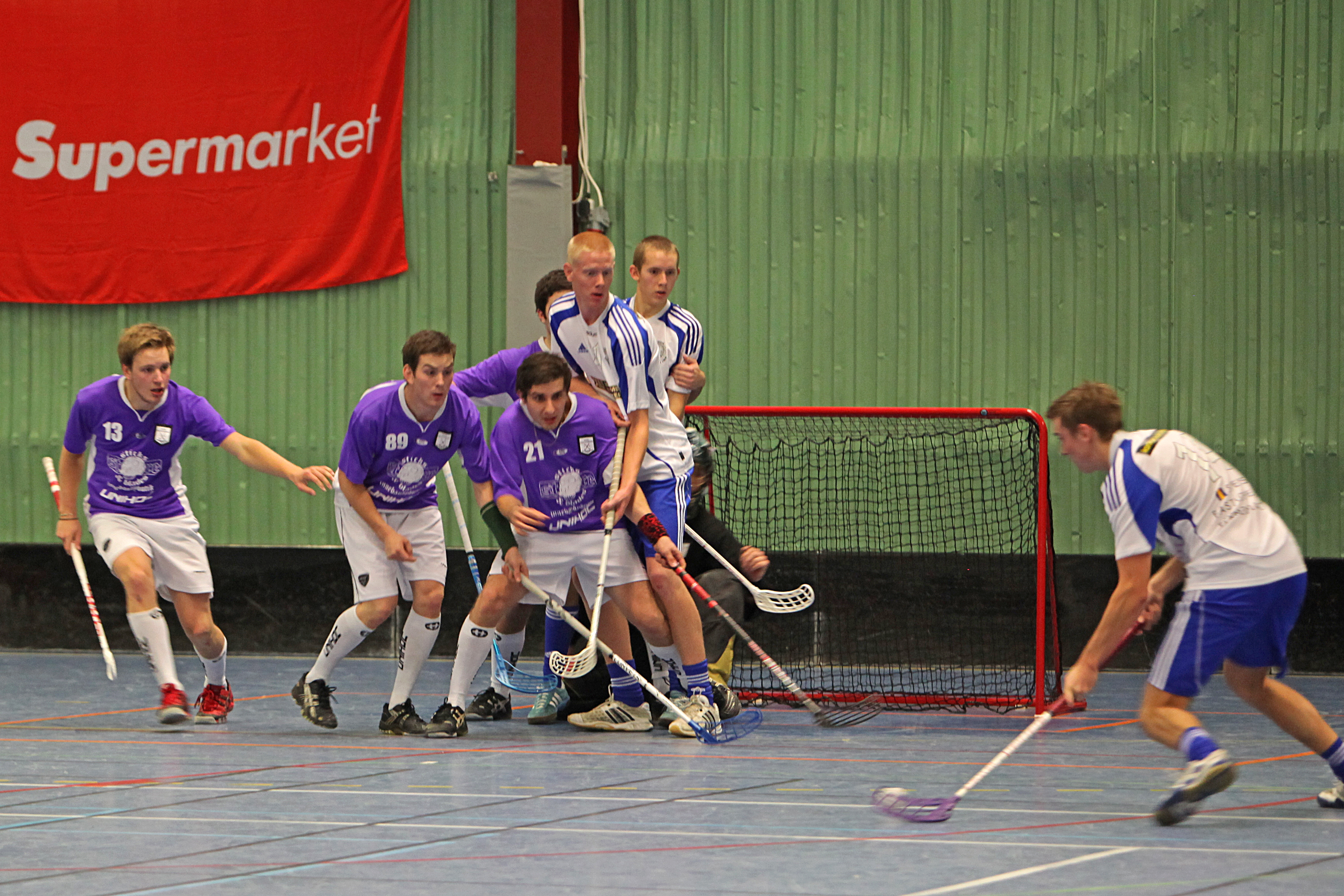 Vaxholms IBF möter Salems IF